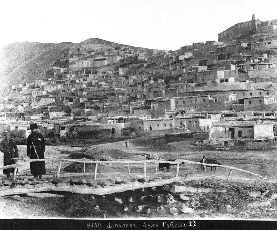 Губден в 19 веке